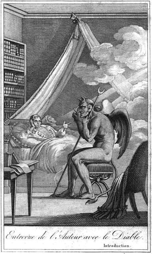 "Entrevue de l'Auteur [Collin de Plancy] avec le Diable".